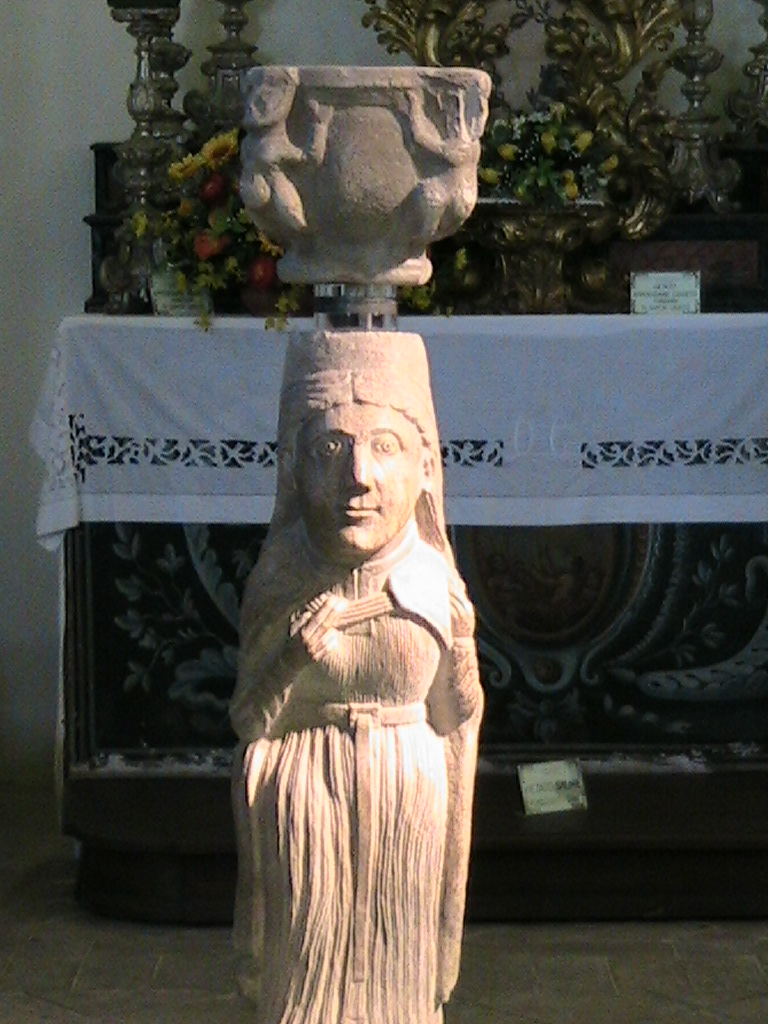 Bardone (Terenzo) - sculture di scuola antelamica